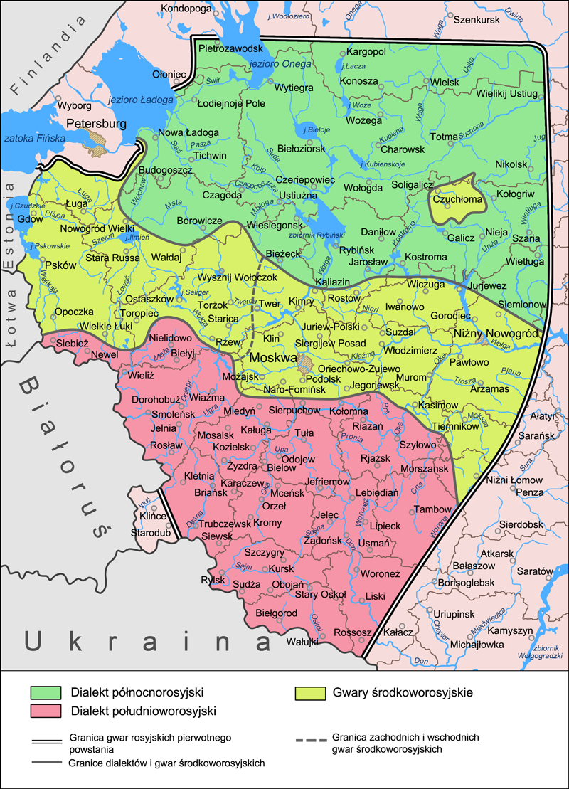 Карта наречий и среднерусских говоров (по диалектологической карте 1965 года)